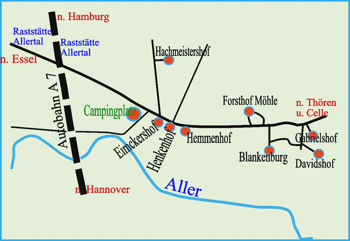 Karte von Engehausen, Stillenhöfen und Blankenburg (Gemeinde Essel, Samtgemeinde Schwarmstedt